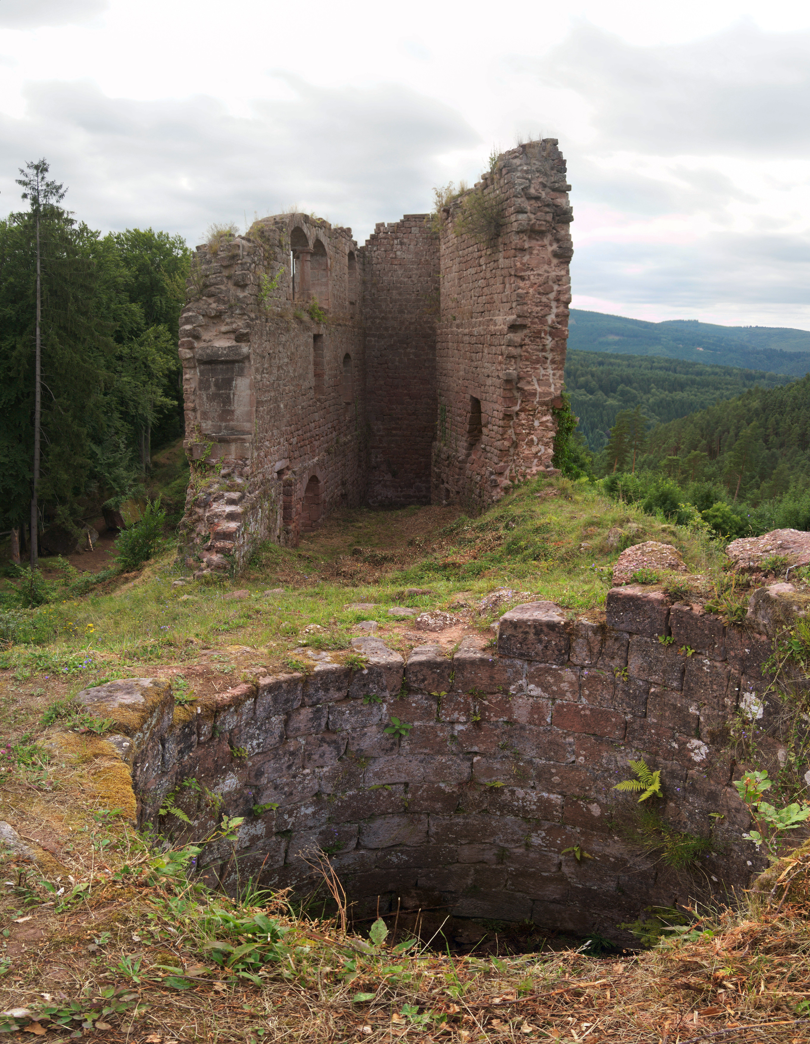 DSC_2355 - DSC_2358